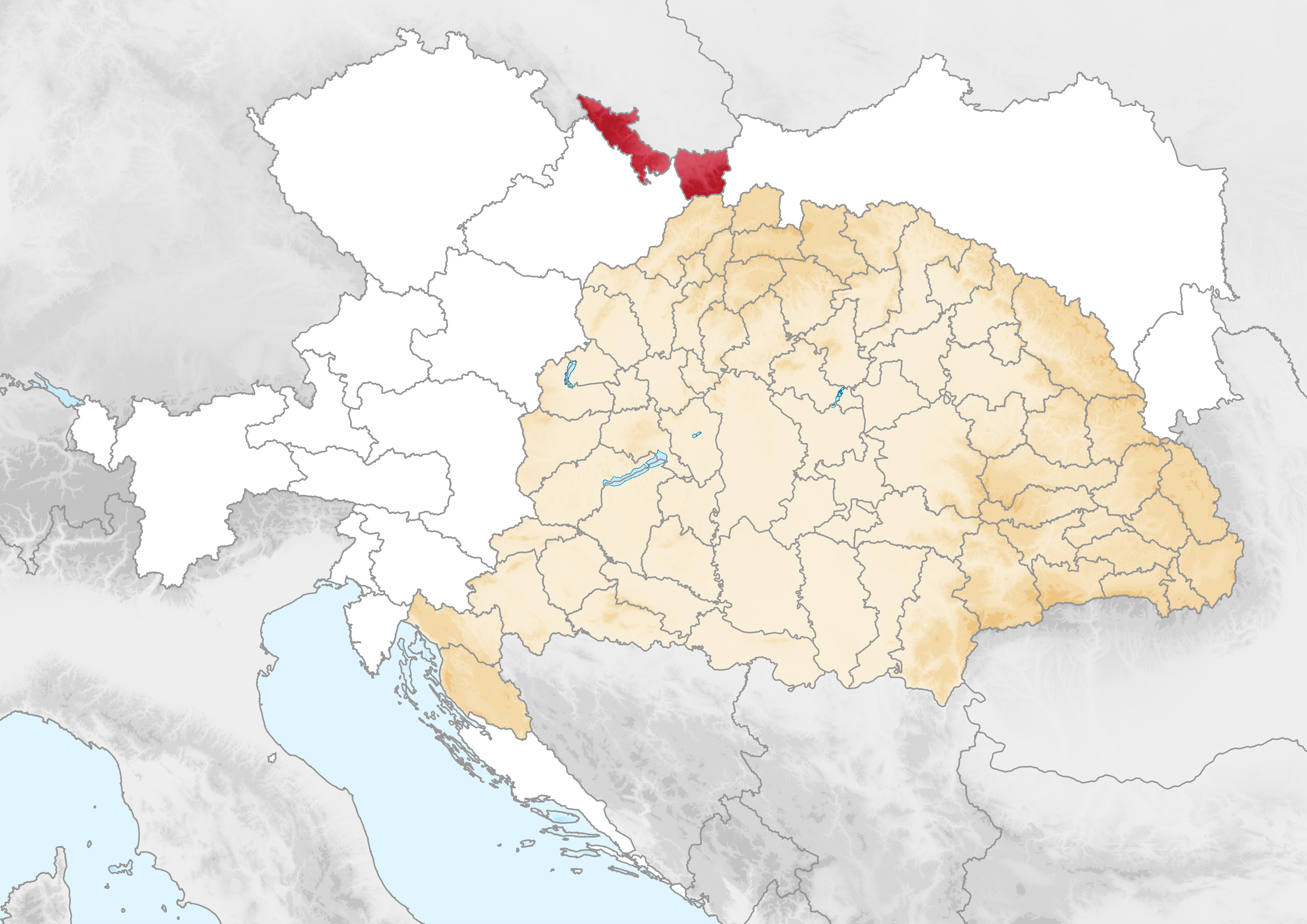 Carte de la Silésie en 1914